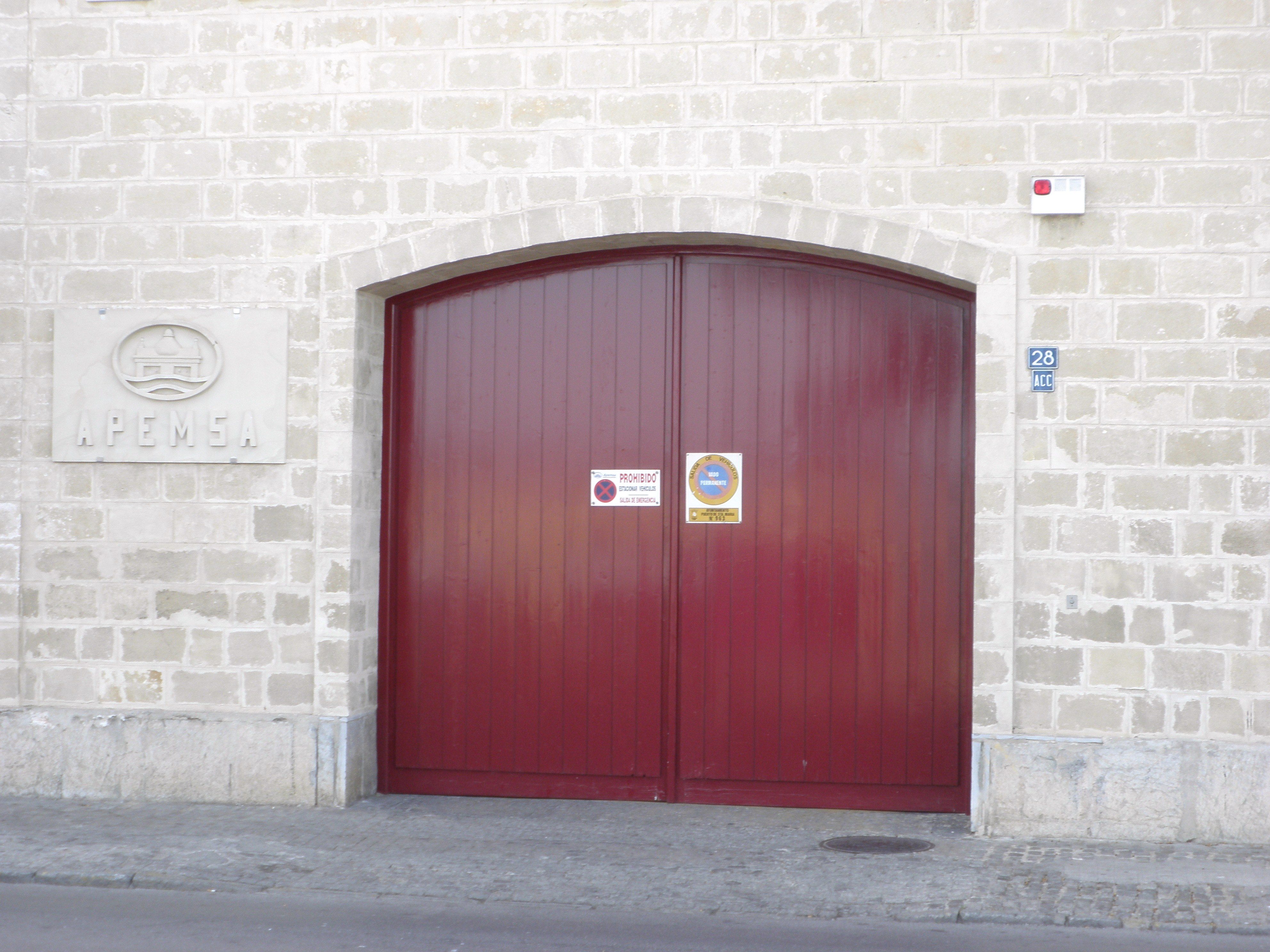 Aguas del Puerto Empresa Municipal Sociedad Anónima de El Puerto de Santa María, España.